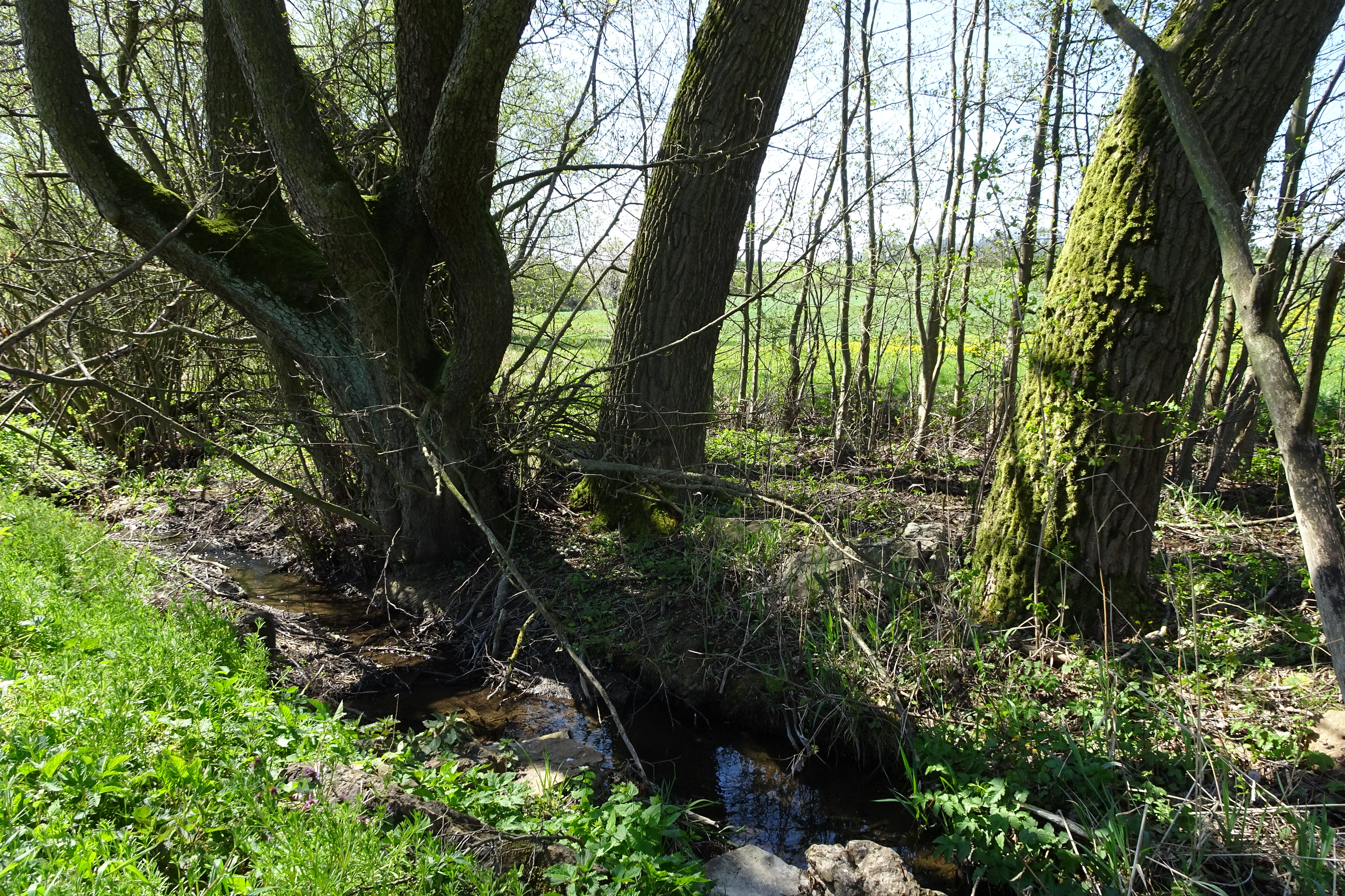 Das „Quellgebiet der Weißen Gelster“ liegt im Velmeder Tal, südlich von Laudenbach im westlichen Meißnervorland. Umgeben wird der von Kalkquellsümpfen, Hochstaudenfluren, Seggenrieden und Feuchtbrachen geprägte Bereich von landwirtschaftlich genutzten Flächen. Um von dem Gelände, das zum Lebensraum seltener und gefährdeter Pflanzenarten sowie bedrohter Tierarten geworden ist, Störungen fernzuhalten, wurde das Grundstück im Jahr 1991 als Naturschutzgebiet ausgewiesen. Es ist zudem Teil eines Flora-Fauna-Habitat-Gebiets und eines Europäischen Vogelschutzgebiets. Das Naturschutzgebiet im nordhessischen Werra-Meißner-Kreis besitzt eine Größe von rund 11,5 Hektar, hat die nationale Kennung 1636022 und den WDPA-Code 165060.